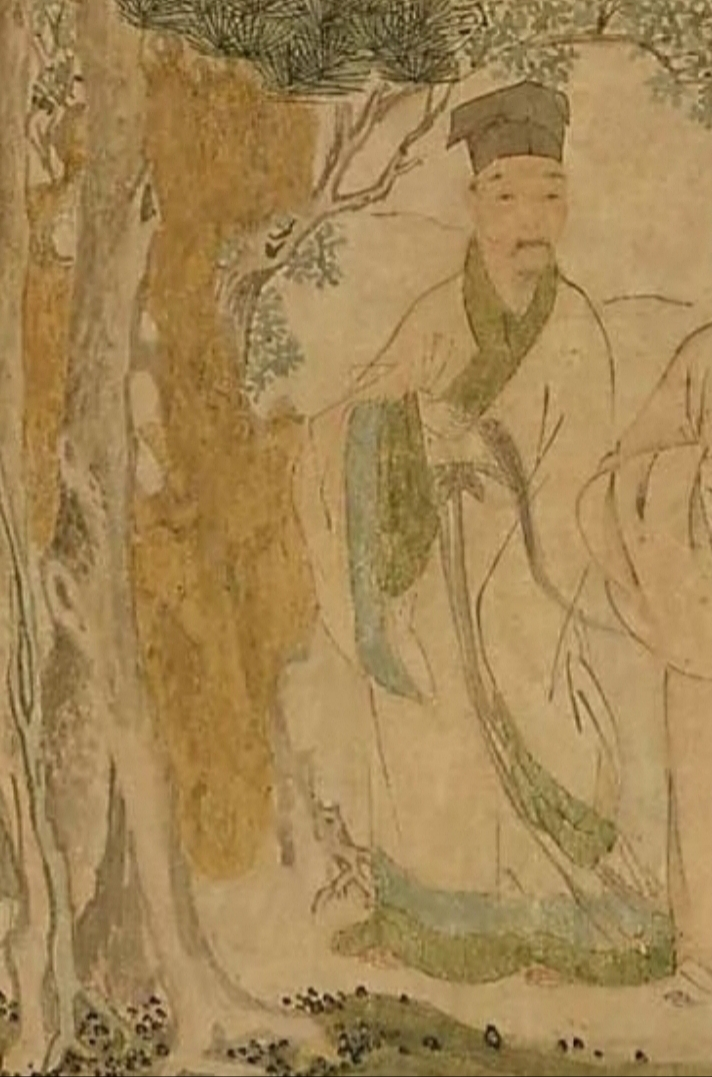 王穉登（1535年－1613年），字百穀、百榖、伯榖，號半偈長者、青羊君、廣長庵主等，直隸長洲（江蘇蘇州）人，晚明文人。